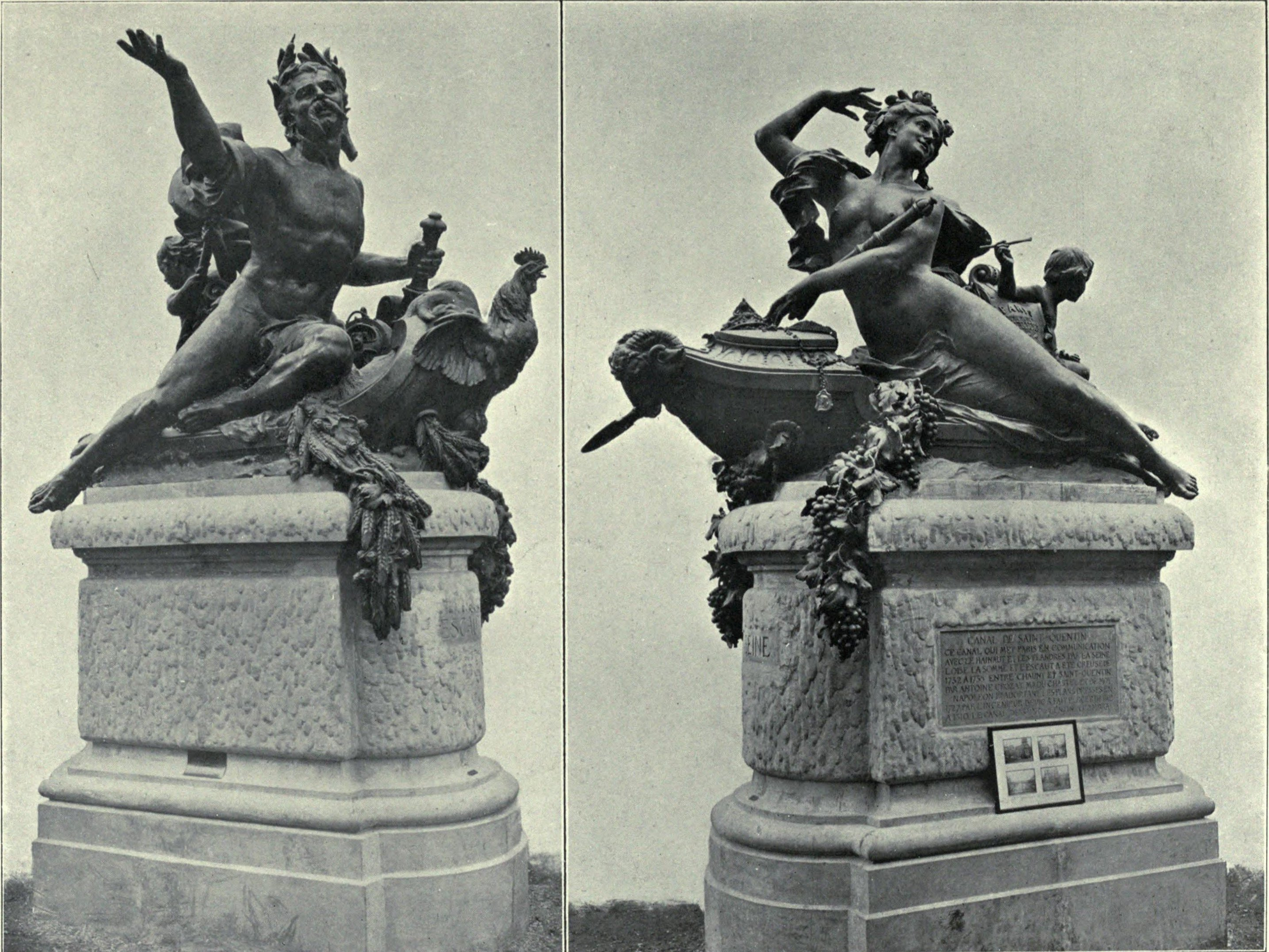 L'Escaut et La Seine, décoration du pont du Canal à Saint-Quentin